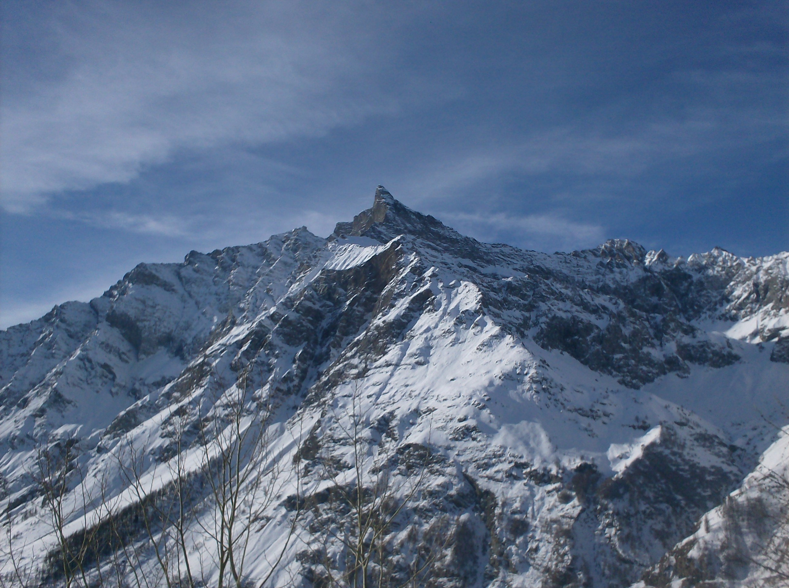 Grande Rousse - Val di Rhemes